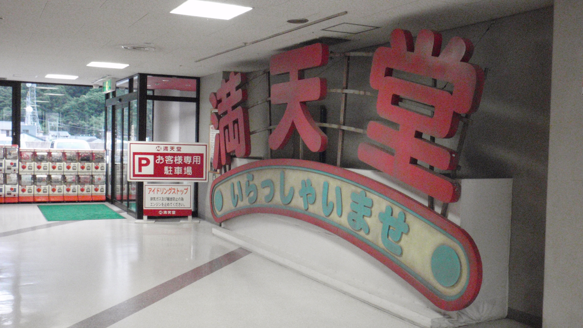 映画「県庁の星」ロケ地の天満屋ハピータウン高梁店（通称ポルカ）に展示されている撮影時の大道具。作中に登場する「満天堂」の看板。